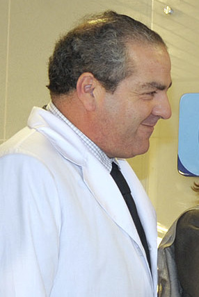 04-10-2011 Inauguración del Hospital Regional de Punta Arenas